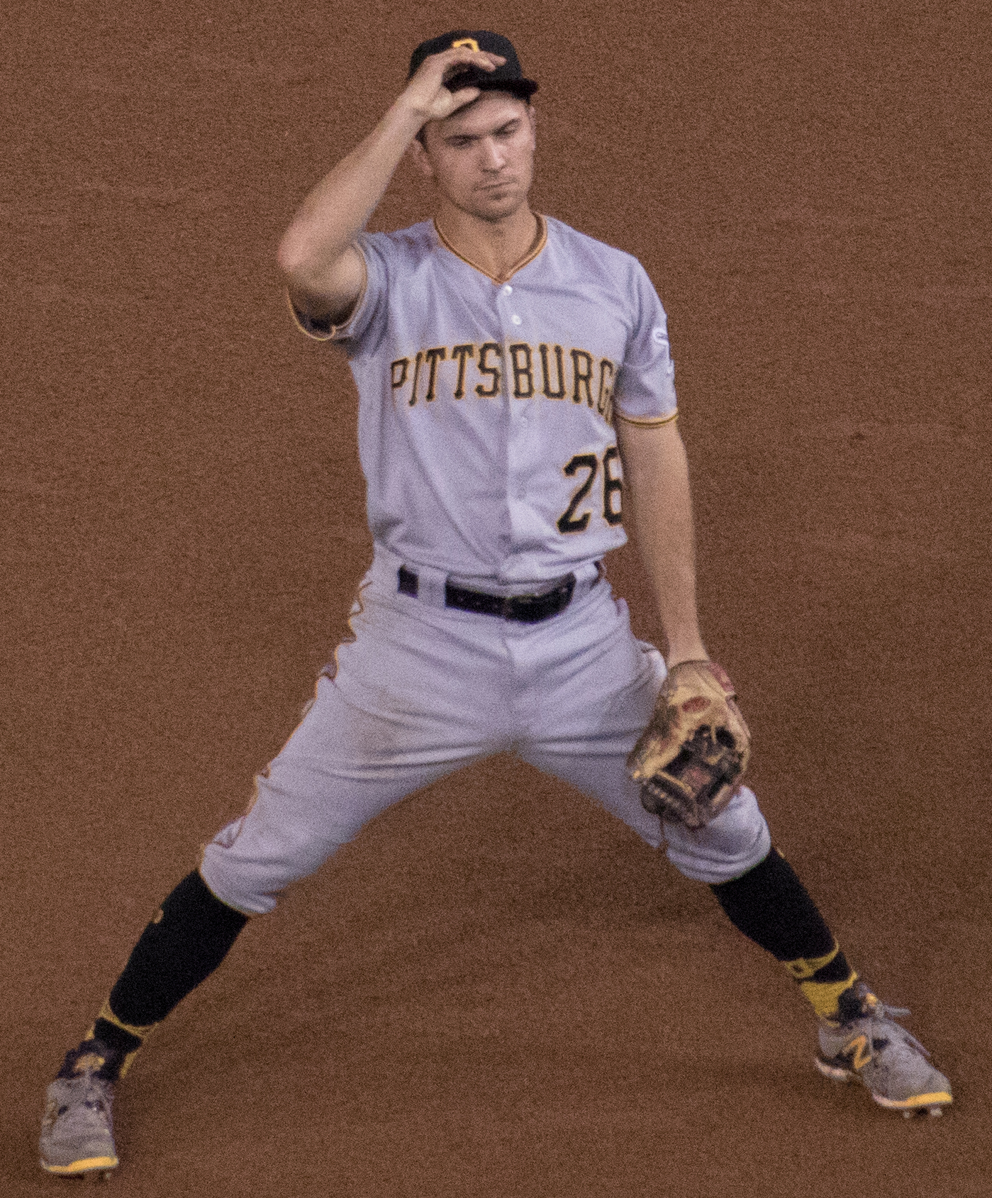 Adam Frazier